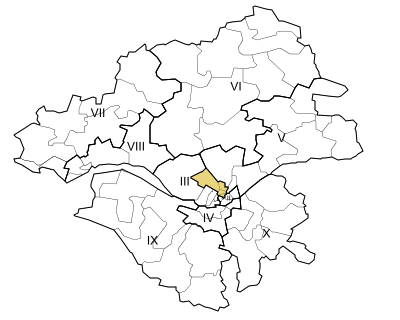 Carte de la première circonscription de la Loire-Atlantique